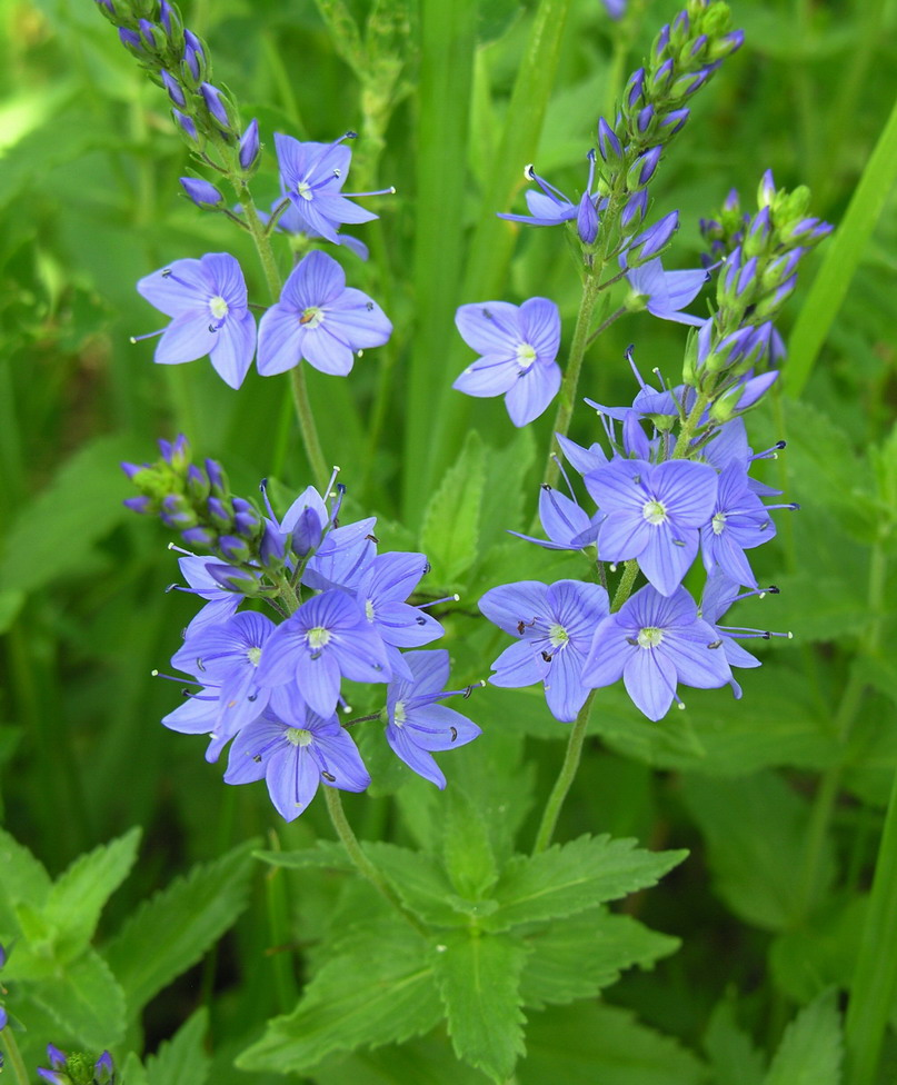 Plačialapė veronika (Veronica teucrium) Šeima. Bervidiniai (Scrophulariaceae) Foto: Algirdas, 2006 m. birželio 24 d., Lietuva